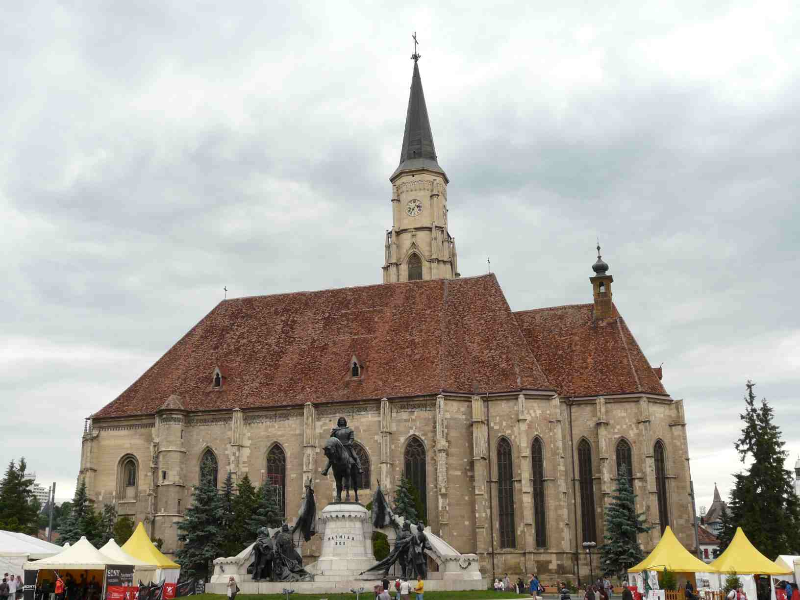 A kolozsvári Szent Mihály-templom, előtte Fadrusz János alkotása, a Mátyás király szobor